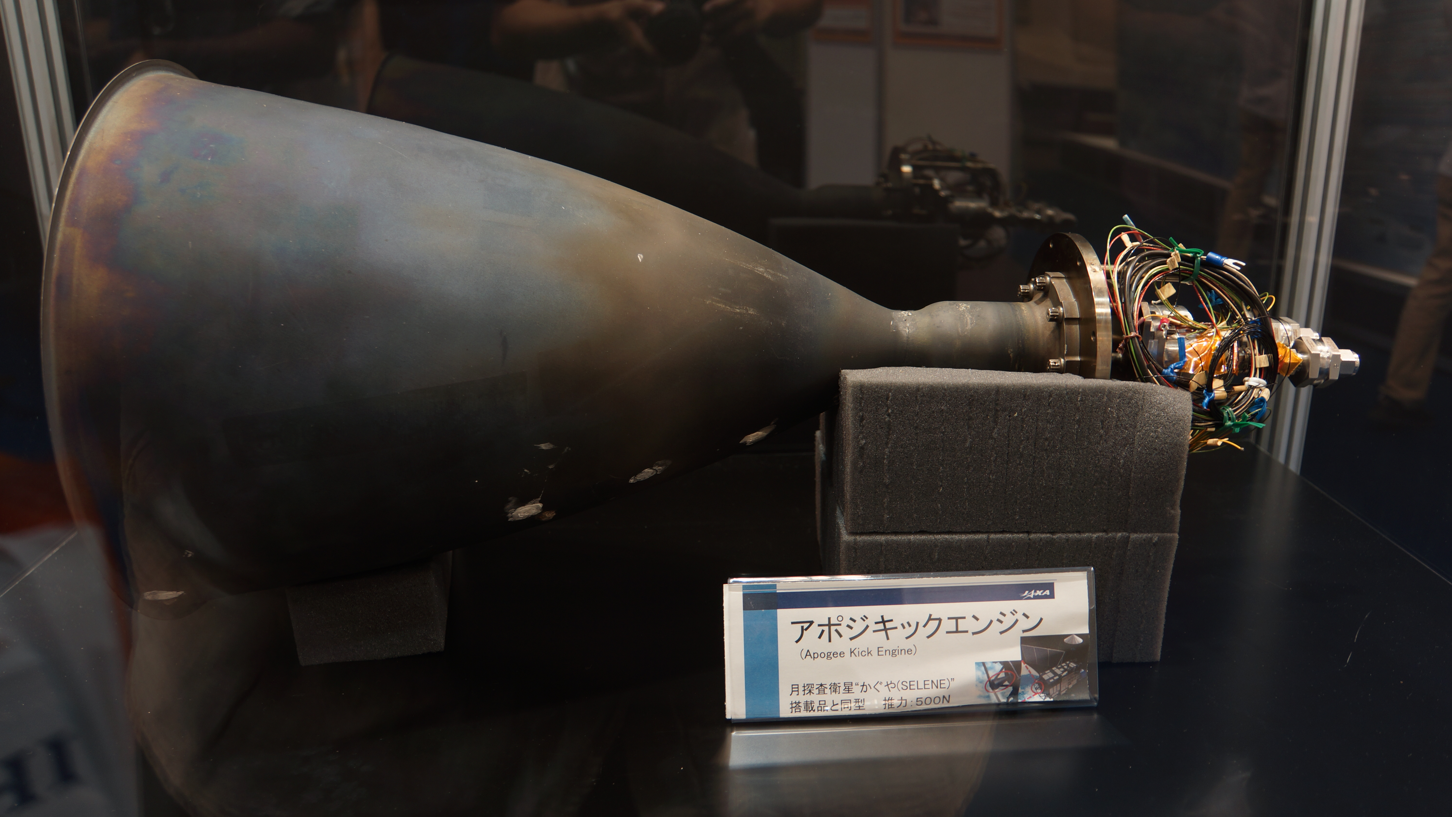 月周回衛星かぐや（SELENE） アポジキックエンジン。 15年7月4日 神戸国際会議場でのHYOGO-KOBE 宇宙博にて。